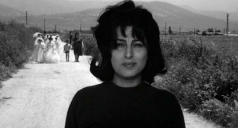 Screenshot from Mamma Roma directed by Pier Paolo Pasolini